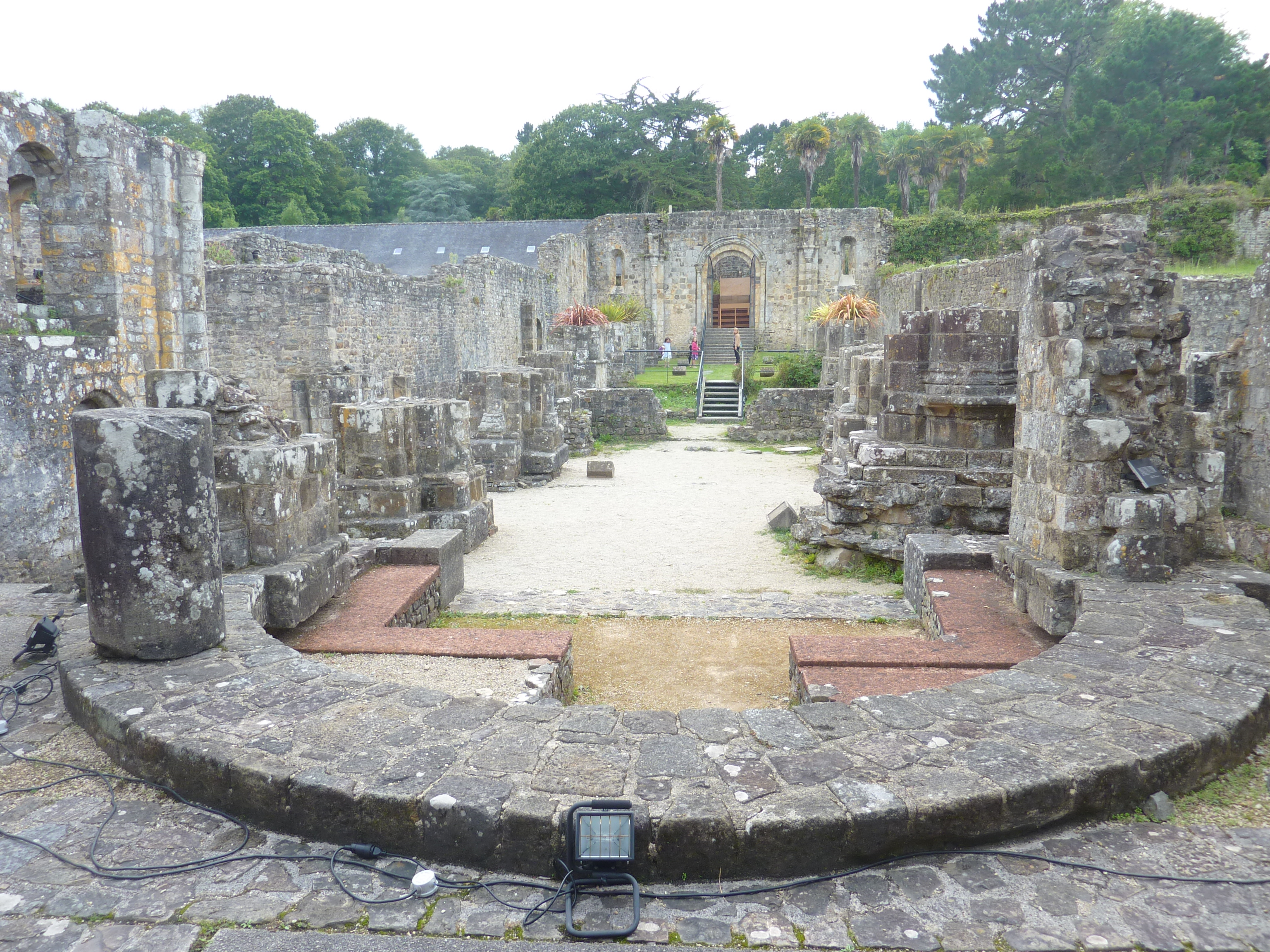 Abbaye de Landévennec : les ruines de l'église abbatiale romane